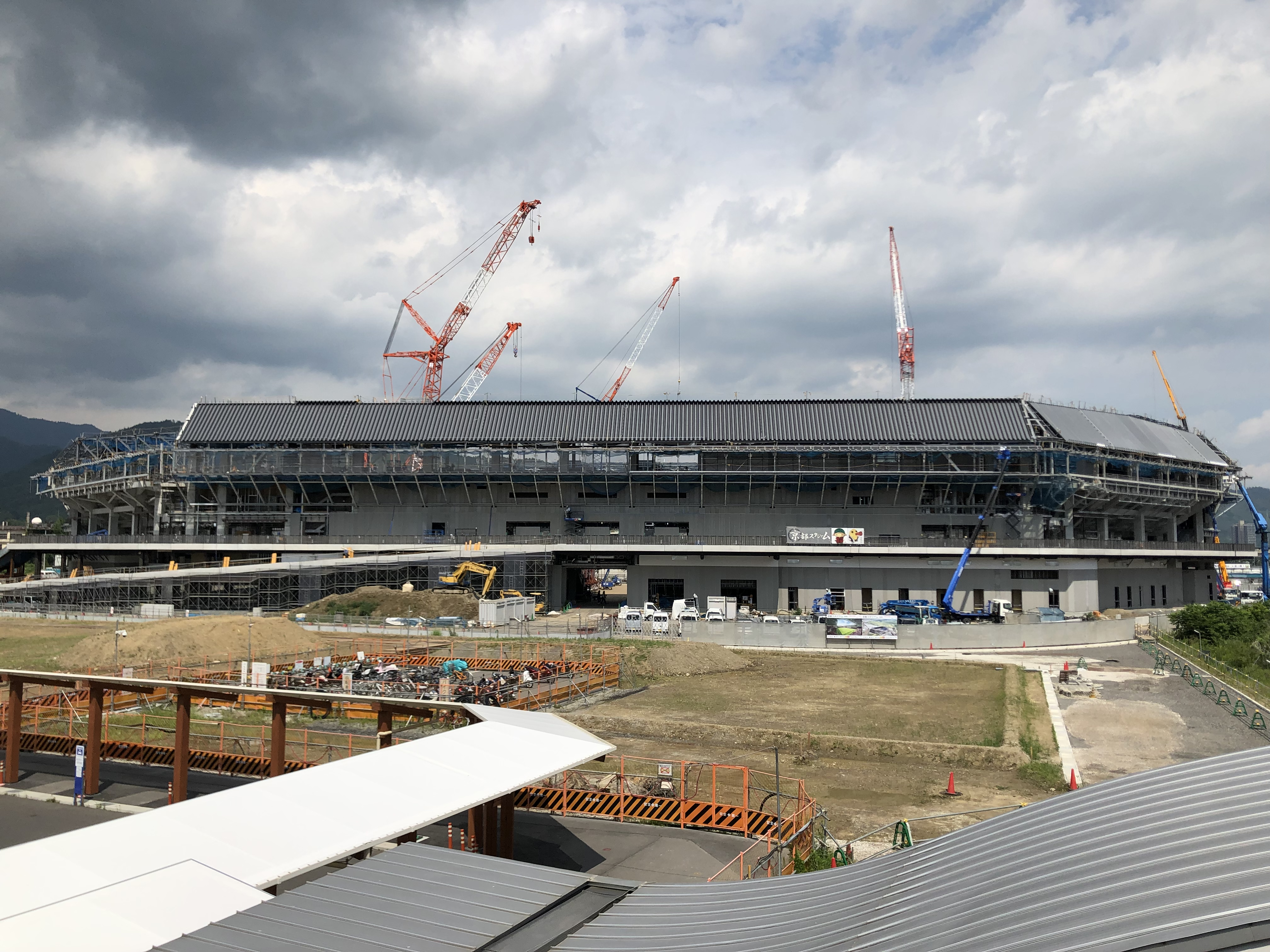 サンガスタジアムby KYOCERA